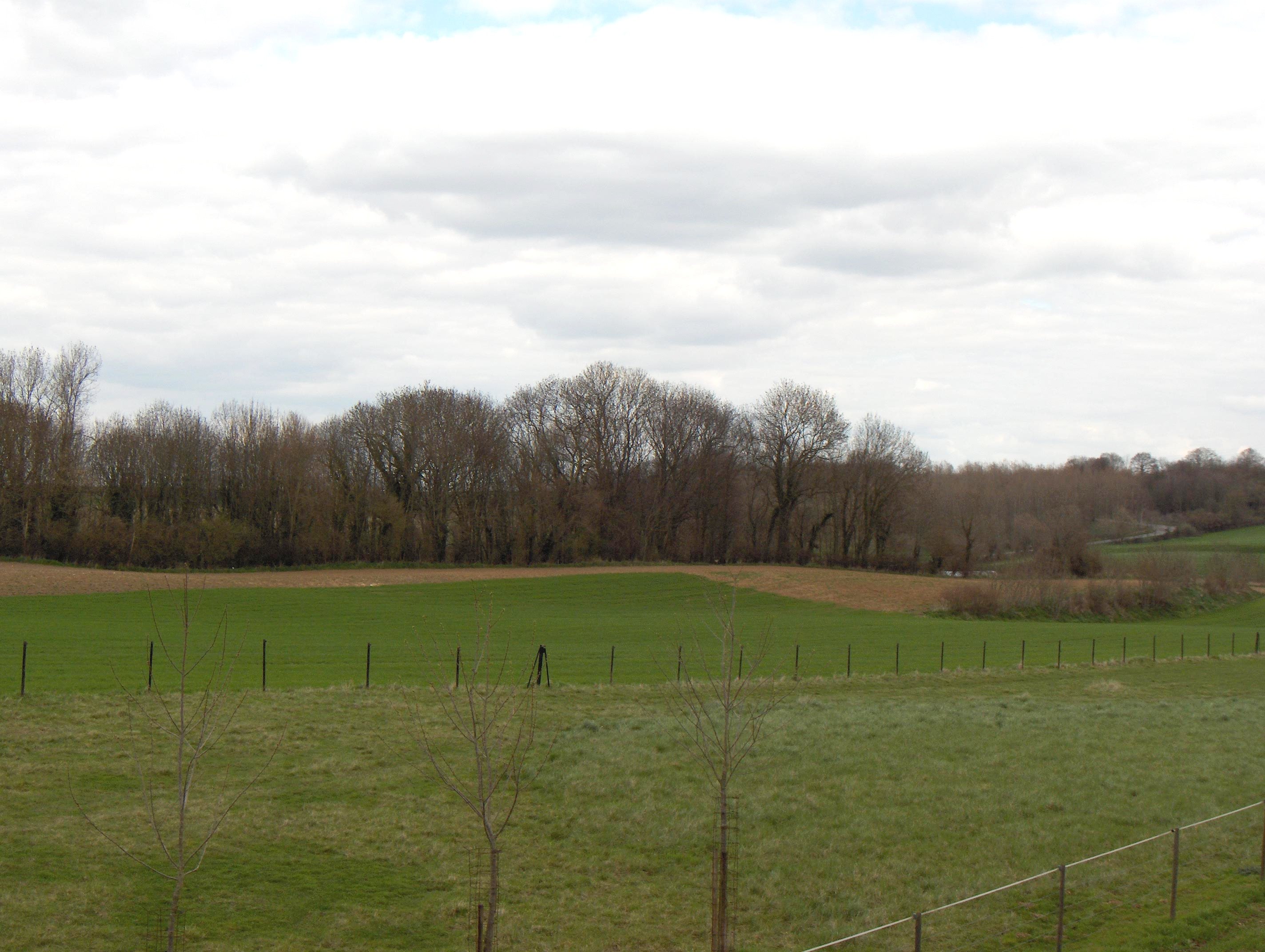 Thérouanne (Frankreich, Dept. Pas-de-Calais), Reste der Stadtbefestigung der zerstörten Stadt auf der Hügel nördlichen der heutigen Dorfmitte (Wall mit Bäumen und Gestrüpp).